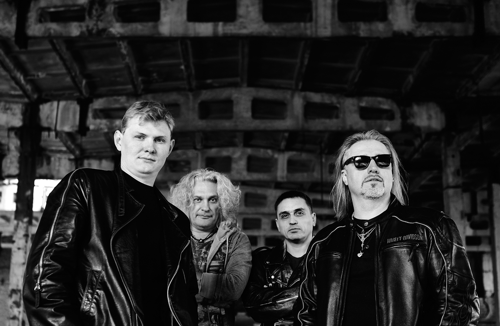 Группа Год Змеи